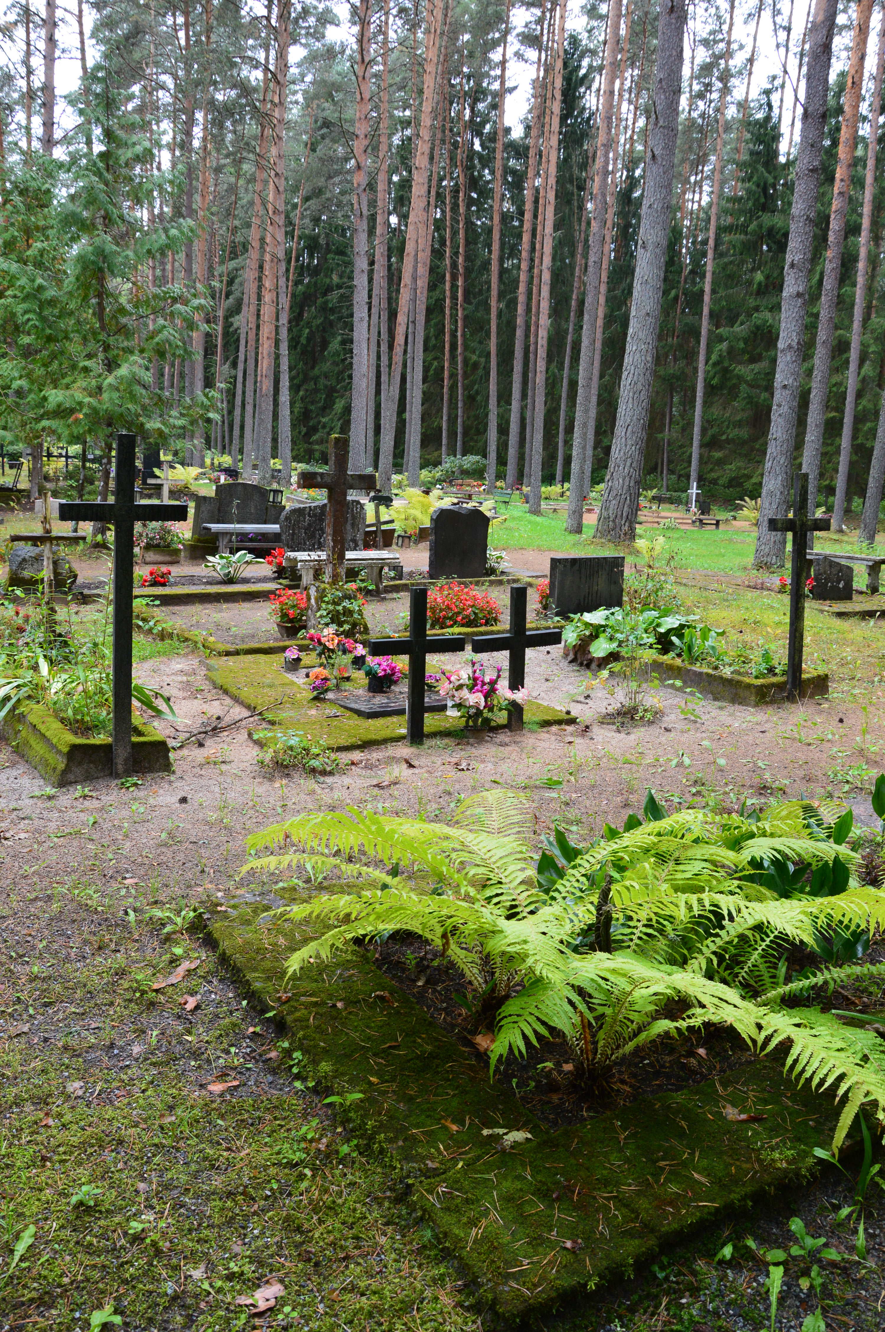 Ritsiku kalmistu